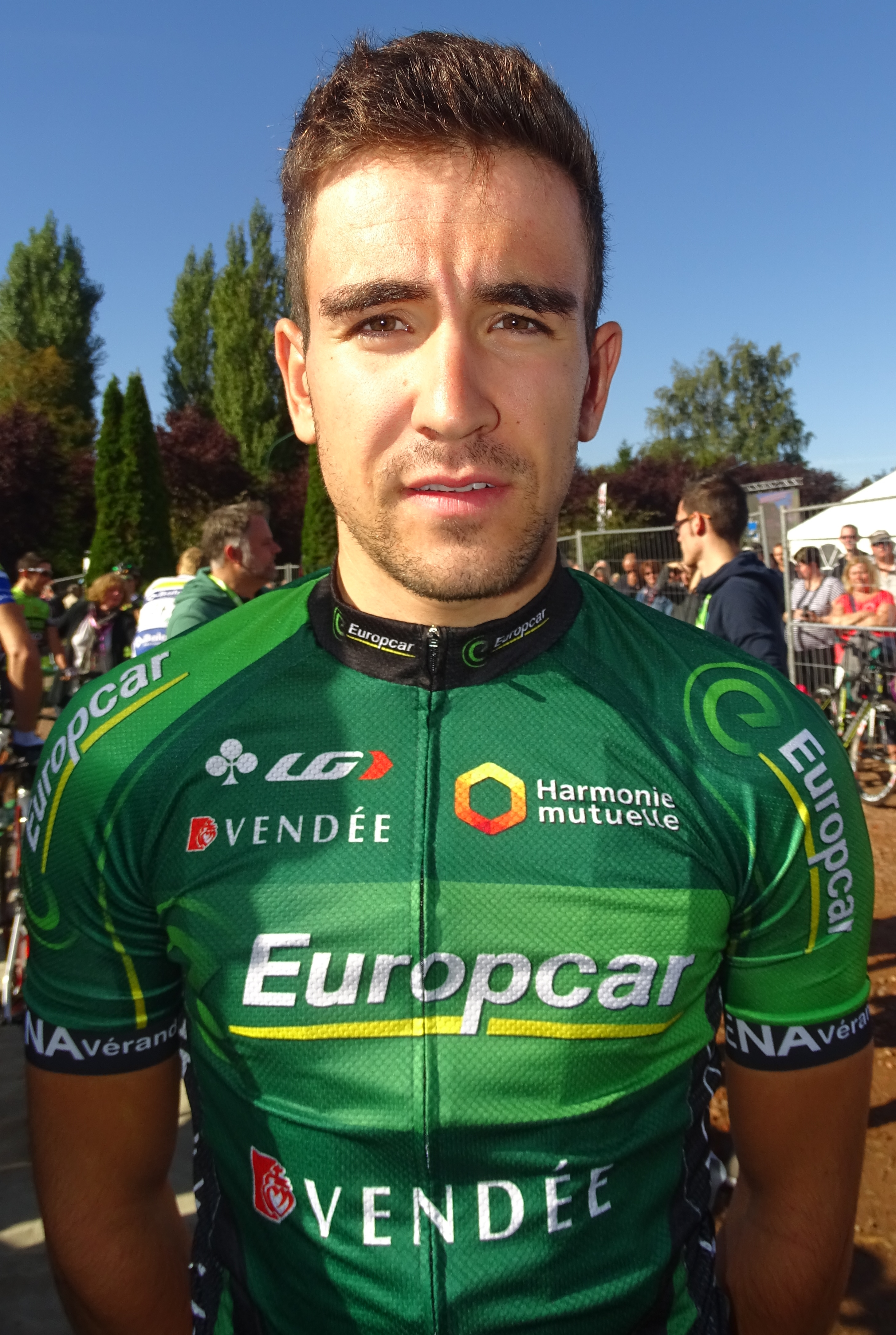 Reportage réalisé le dimanche 20 septembre à l'occasion du départ et de l'arrivée du Grand Prix d'Isbergues 2015 à Isbergues, Nord-Pas-de-Calais, France.